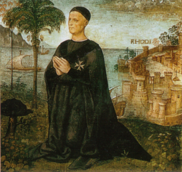 Pinturicchio, storie di san giovanni battista, ritratto di alberto aringhieri in veste di cavaliere di rodi, 1504, siena duomo